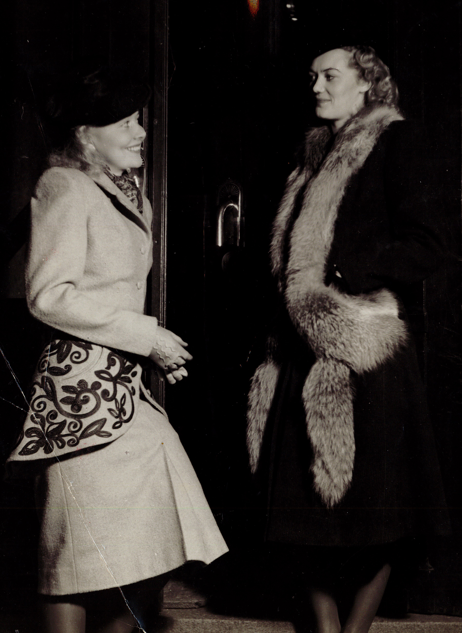 Foto ur Svenbörje Gaborns efterlämnade pärmar. Del av modekatalog, 1950-tal. Fotograf: okänd